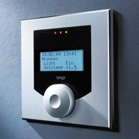 Raumbediengerät